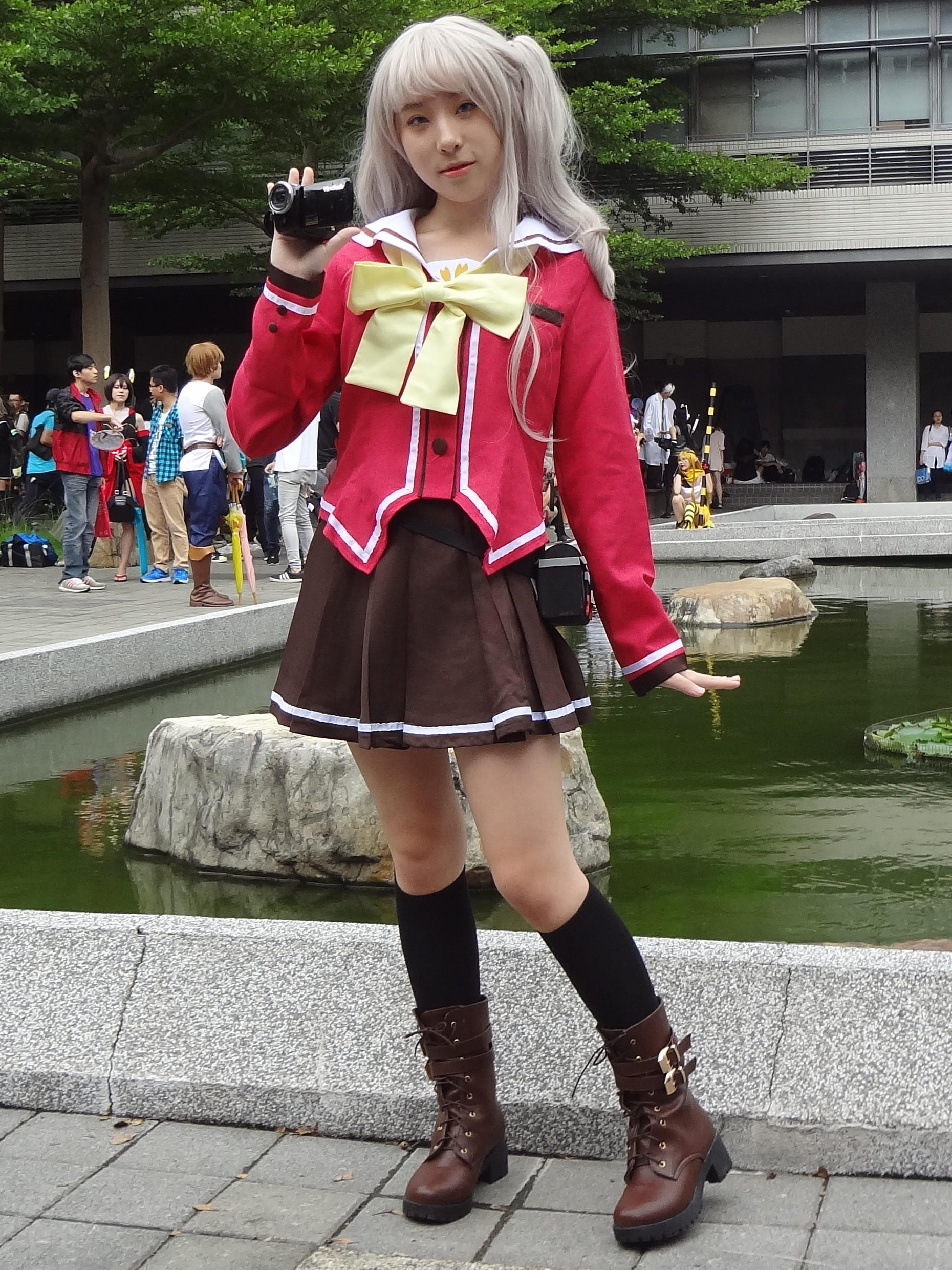 第20屆台灣同人誌販售會台中場，逢甲大學學思園，《夏洛特》友利奈緒cosplayer。